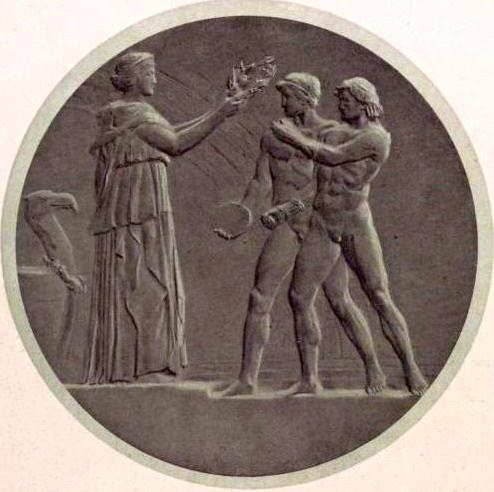 Médailles remises aux vainqueurs des épreuves des Jeux Interalliés de 1919 (grave par Mr Fraysse, Grand Prix de Rome).